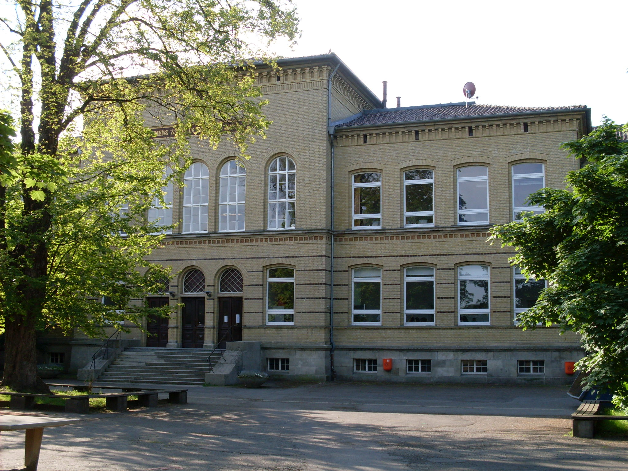 Frontansicht der Großen Schule Wolfenbüttel